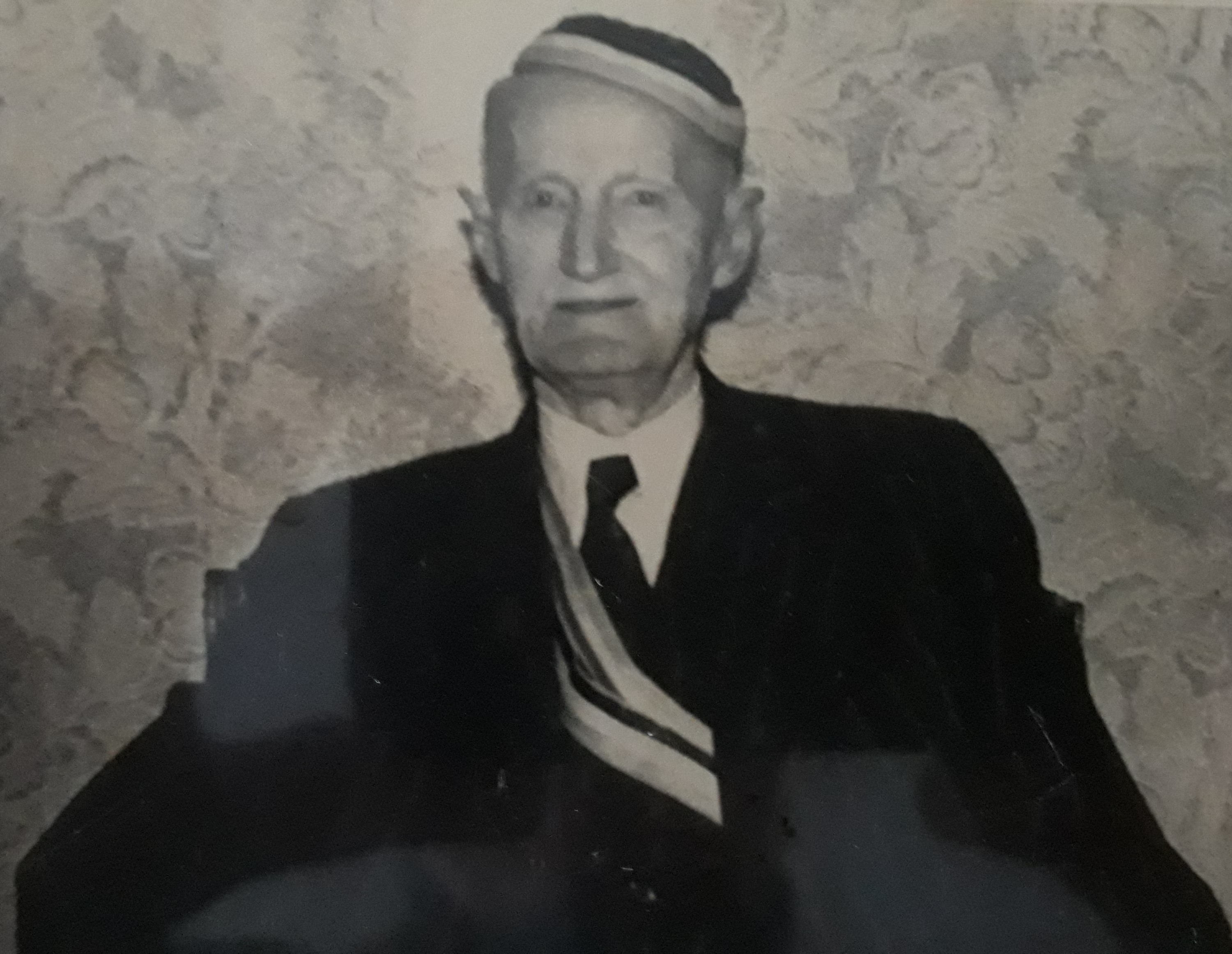 Fotografie von Erich Granaß